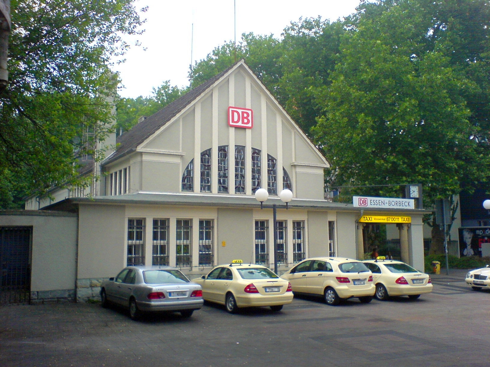 Essen-Borbeck Bf